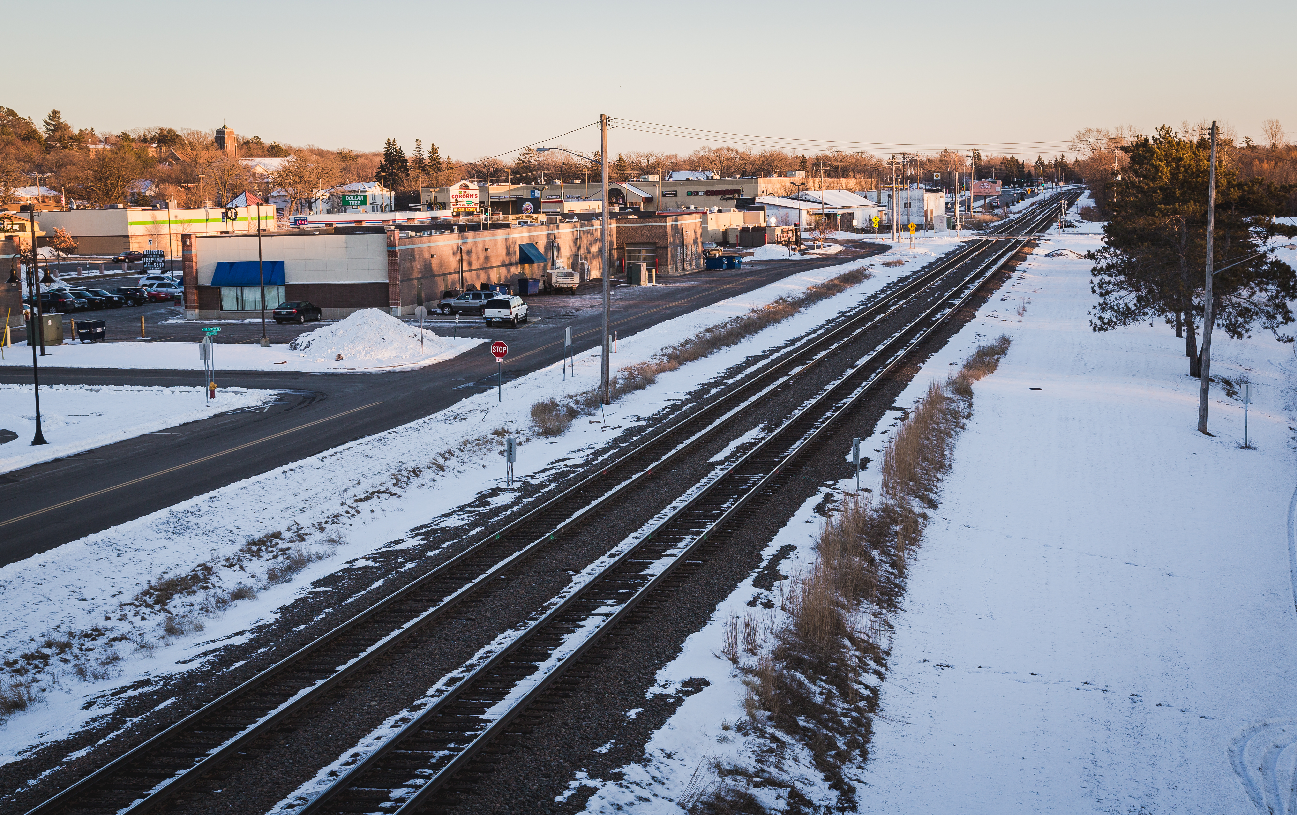 Sauk Rapids, Minnesota